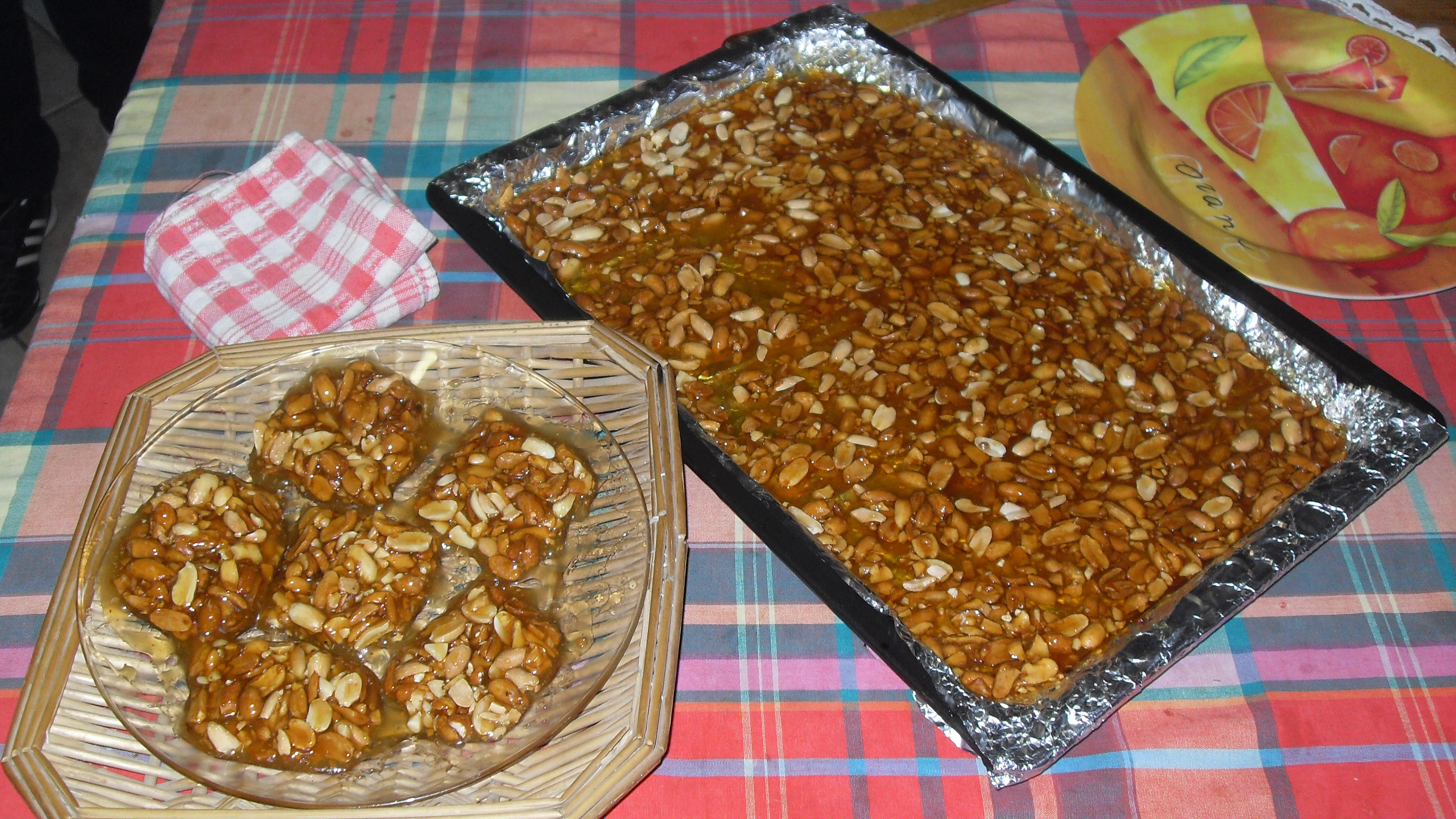 Présentation de la colle pistache